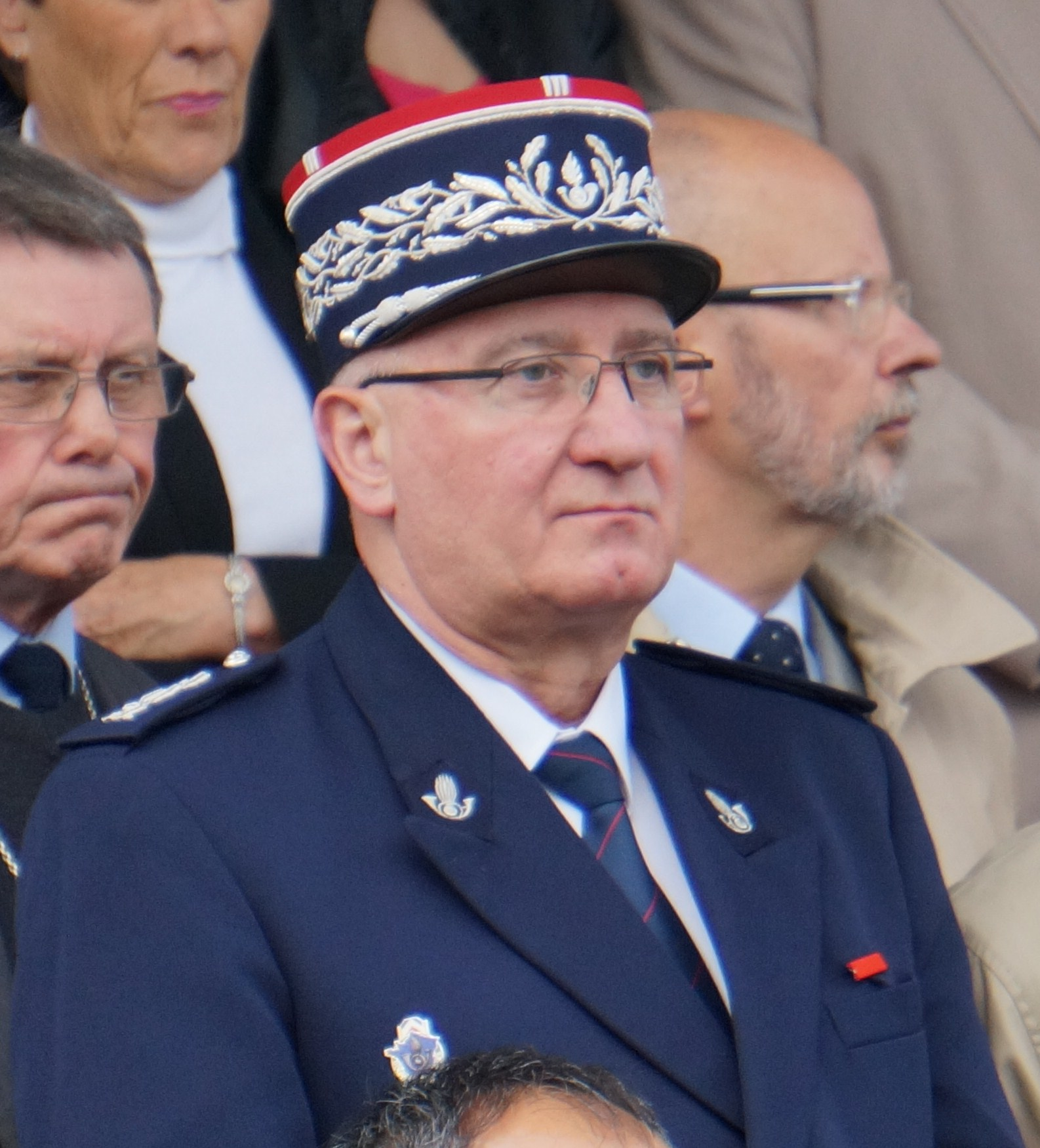 administrateur général des Douanes_françaises_en unifrome.